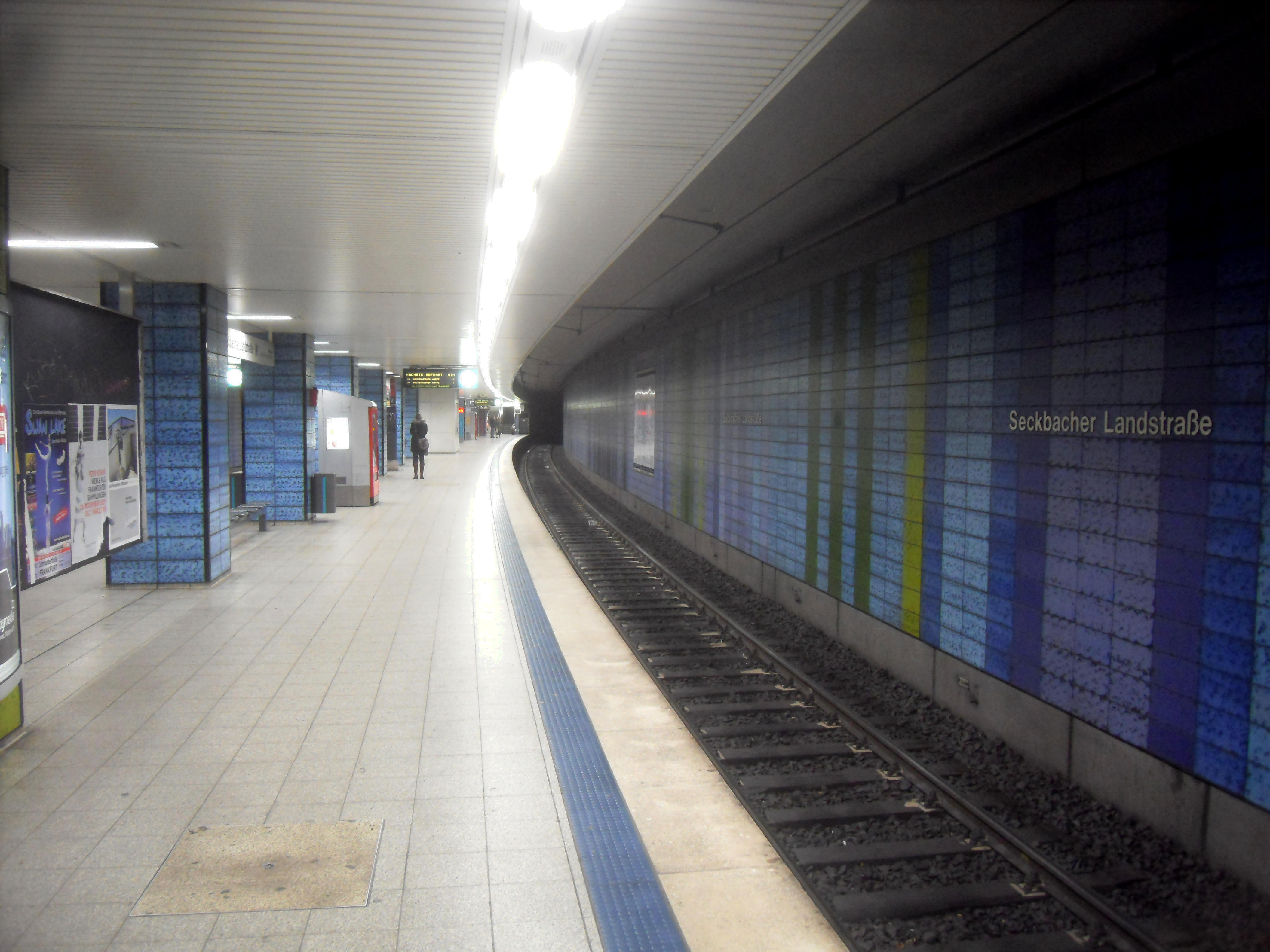 Bahnsteig des U-Bahnhofs Seckbacher Landstraße der U-Bahn Frankfurt auf der Linie U 4 Richtung Bockenheimer Warte in Hessen (Deutschland)